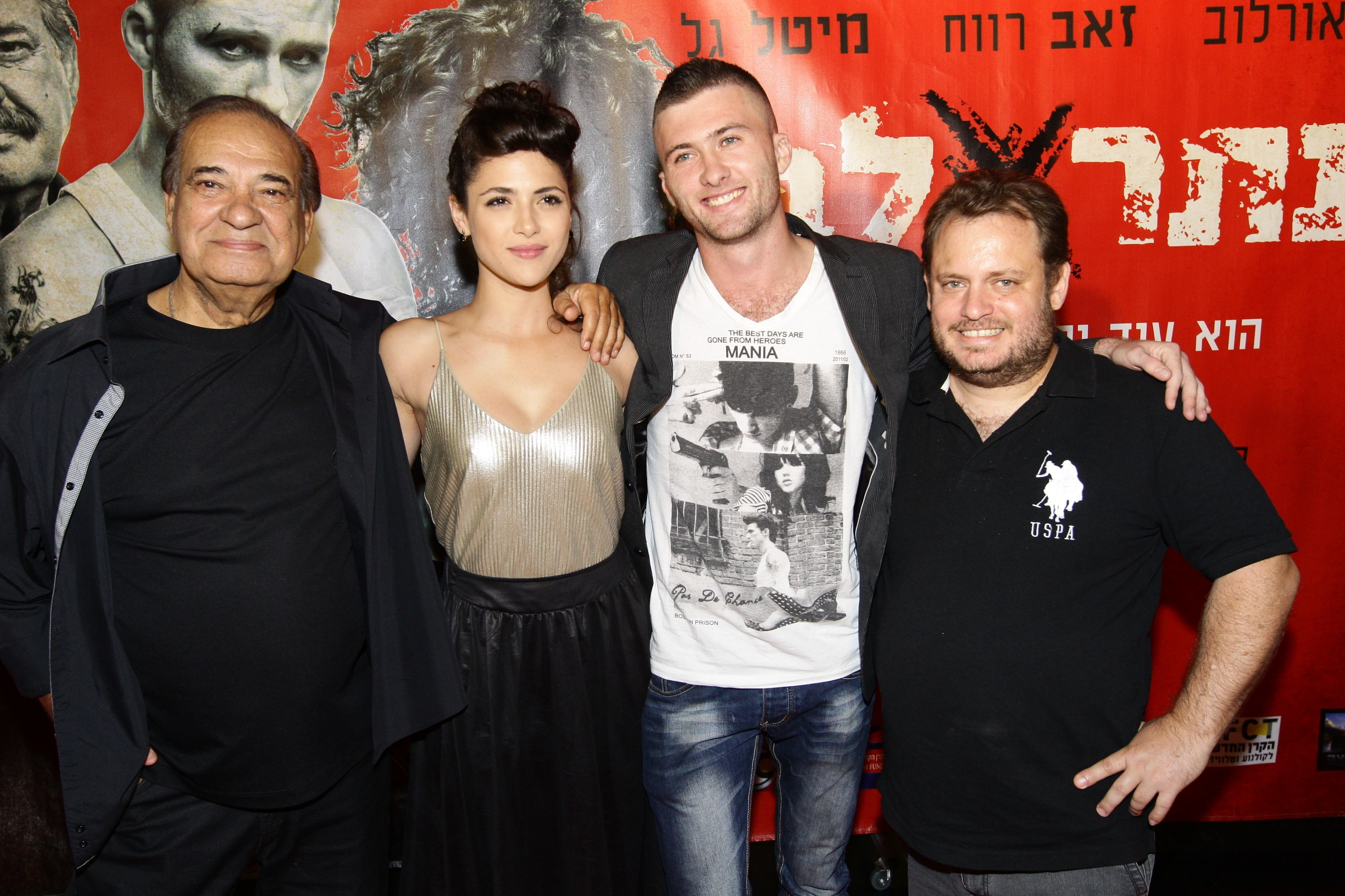 פרימיירת פנתר לבן, משמאל לימין: זאב רווח, מיטל גל סויסה, יבגני אורלוב ודני רייספלד הבמאי